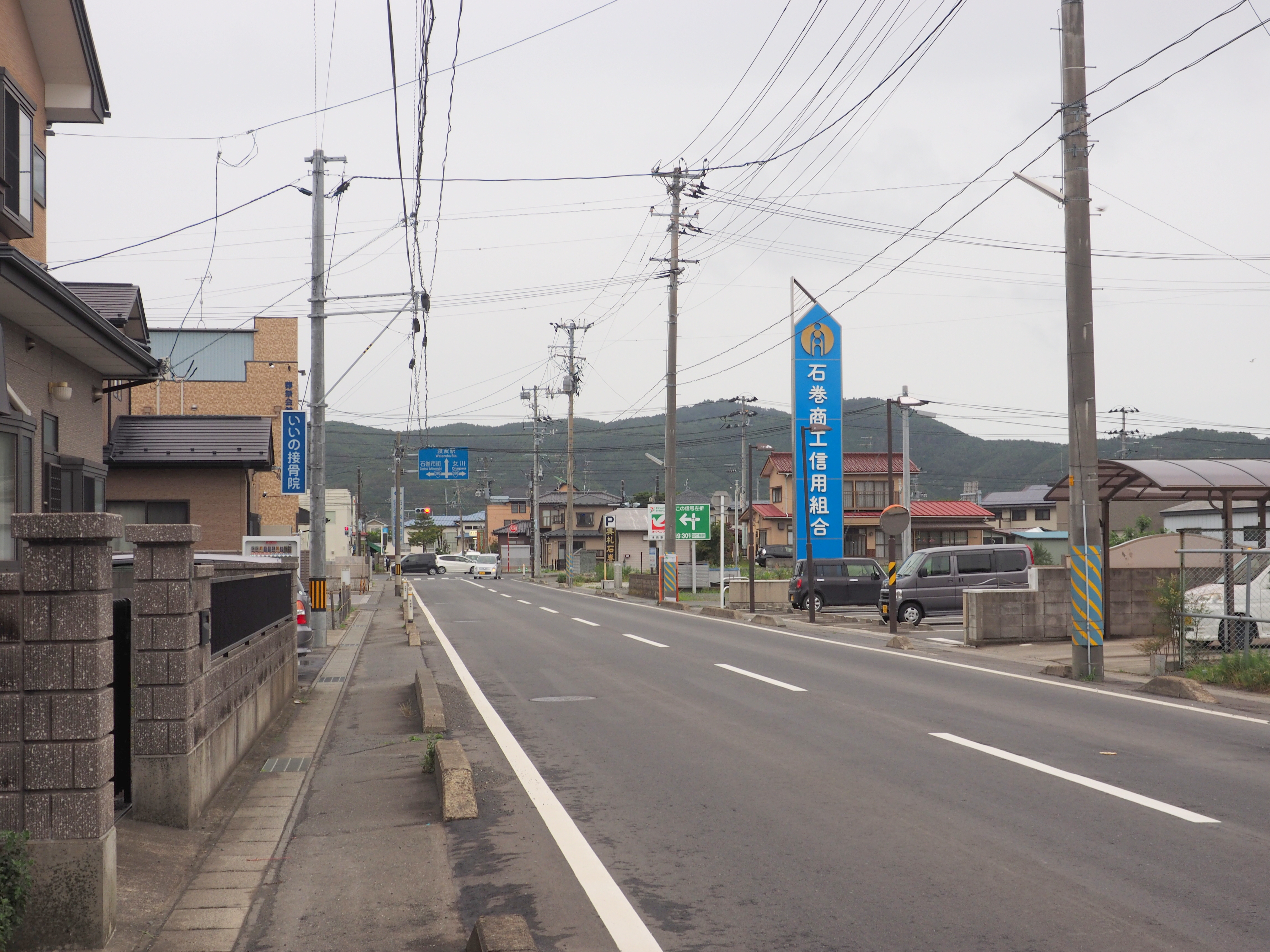 宮城県道2号石巻鮎川線。前方突き当たりに小さく渡波駅が見える。